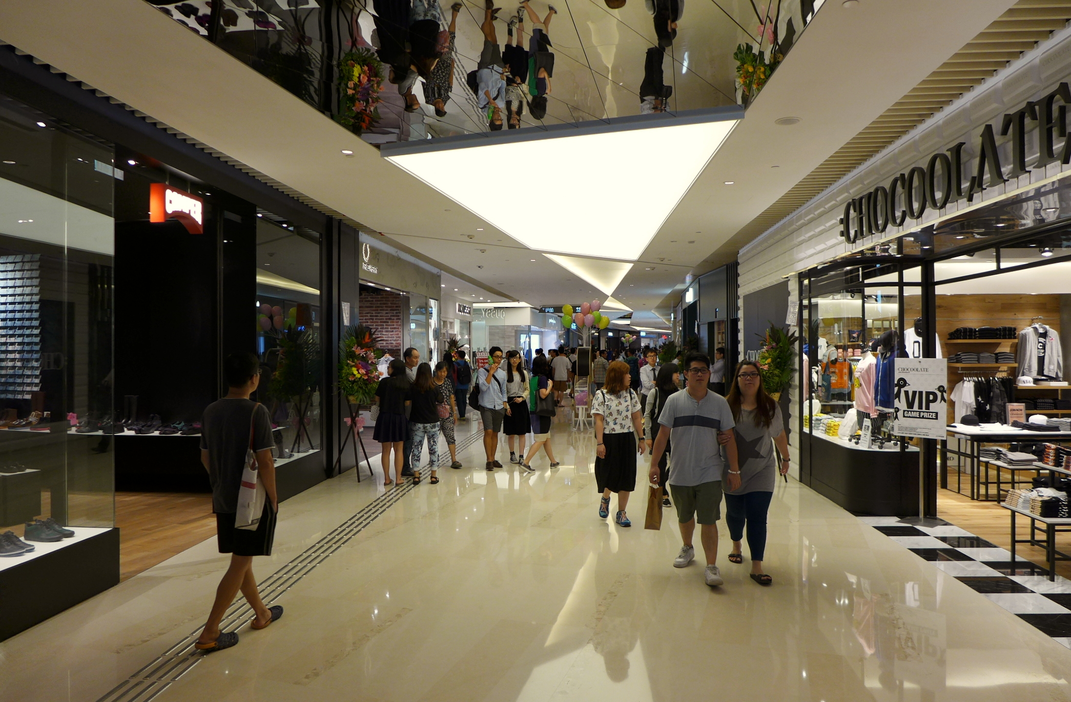 YOHO MALL I Level 1 Access